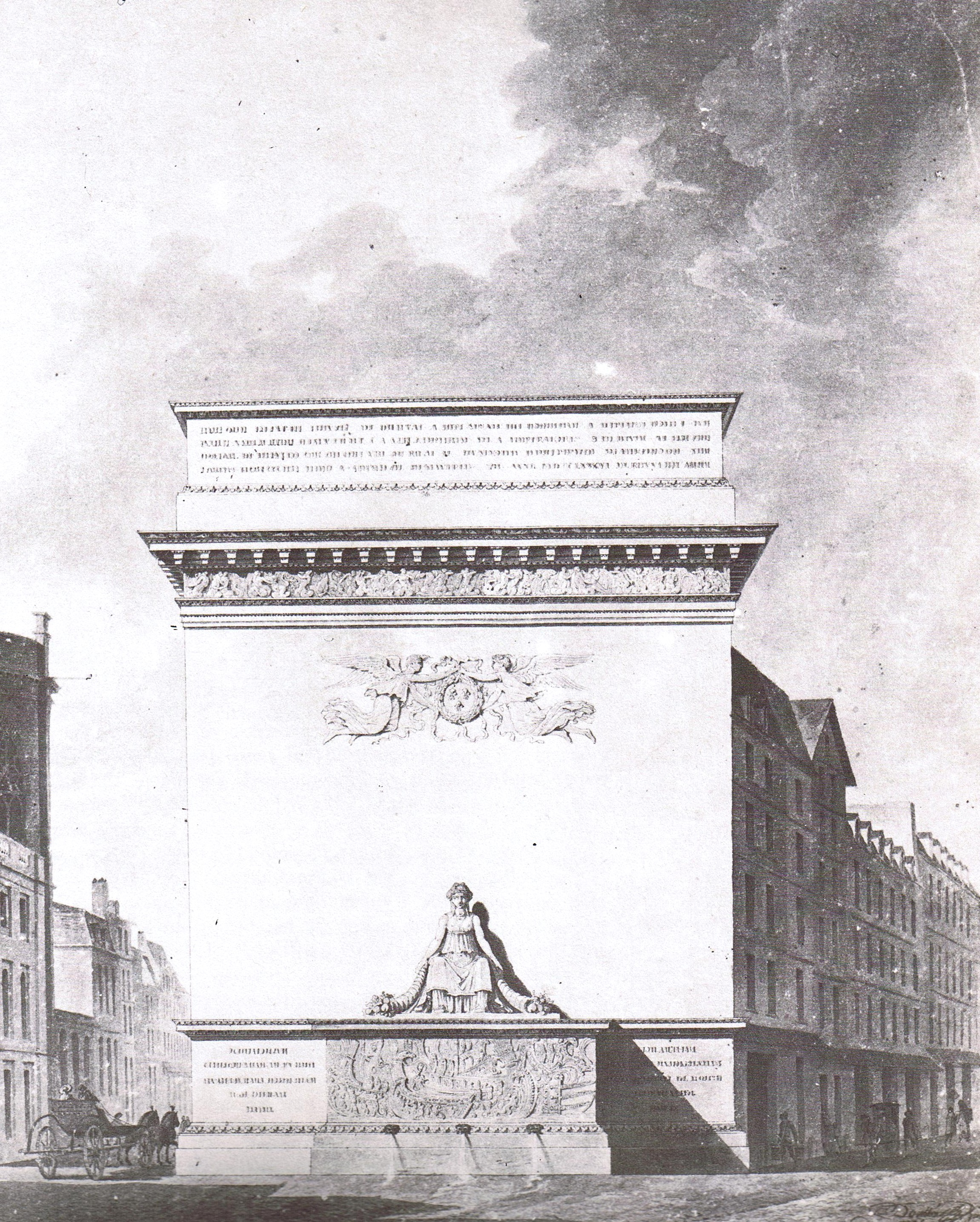 Projet d'Etienne-Louis Boullée pour une fontaine à l'intesection des rue Montmartre et Montorgueil.